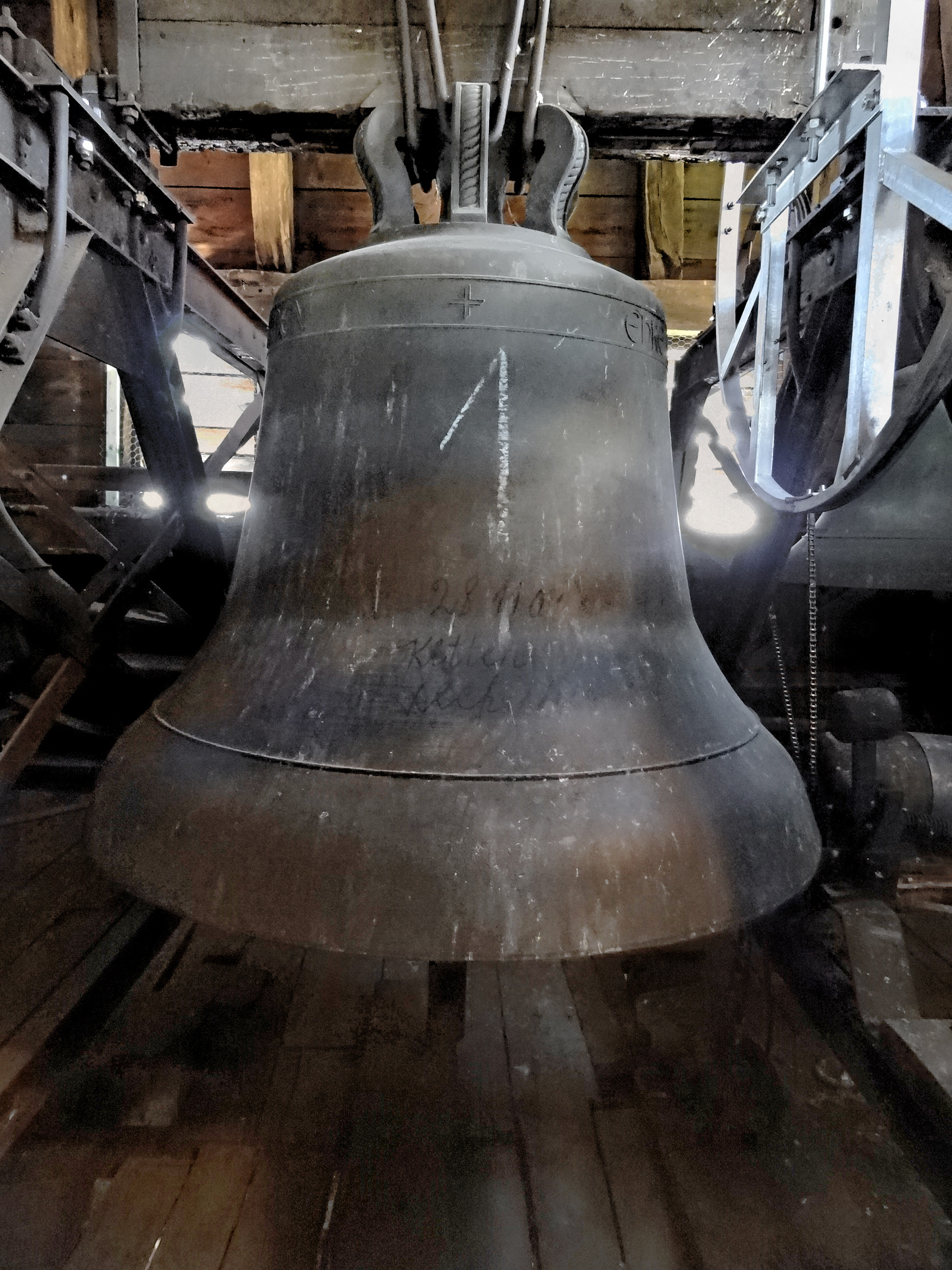 Evangelische Kirche Großen-Buseck